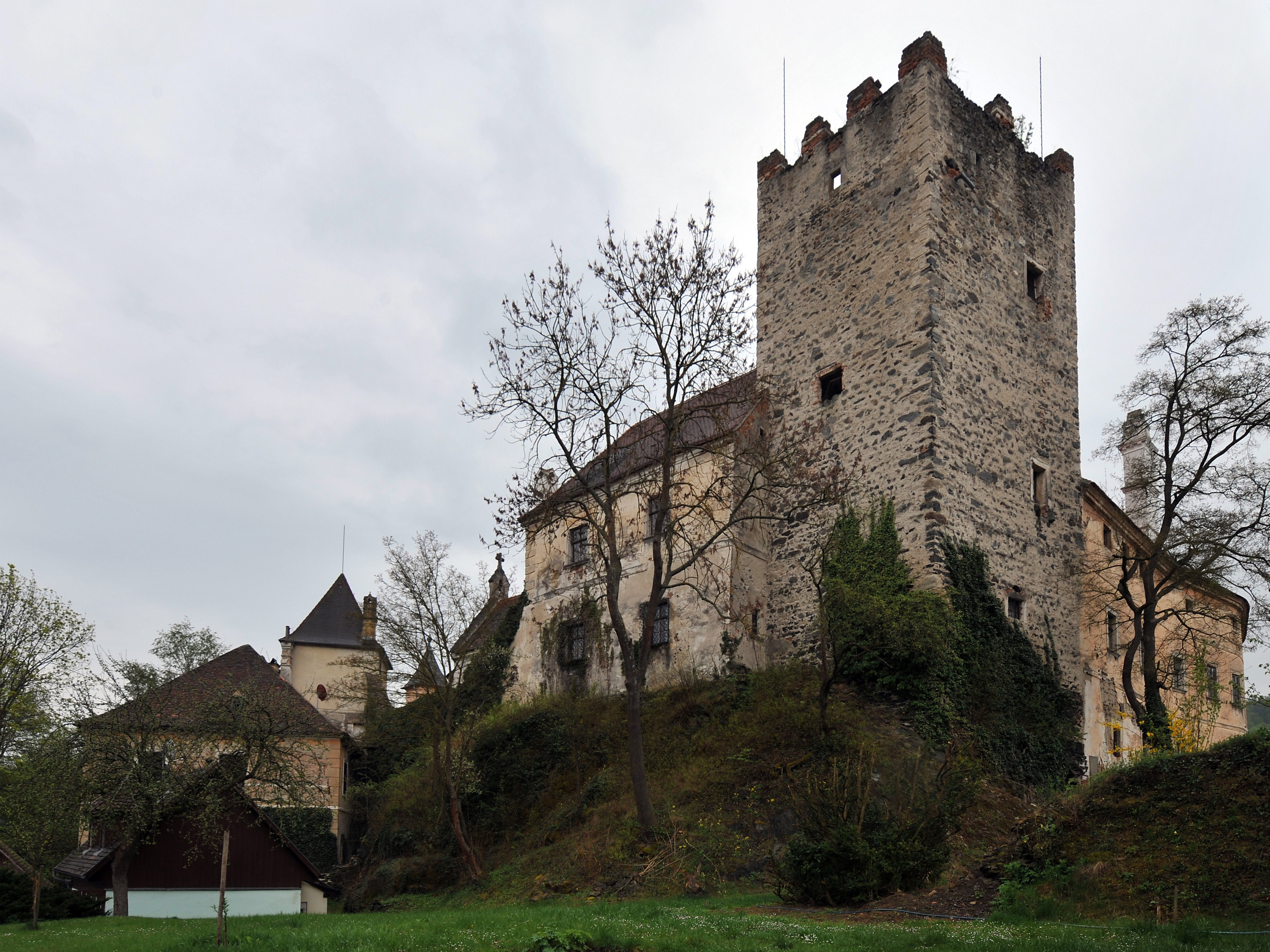 Gars am Kamp, Schloss Buchberg samt Kapelle